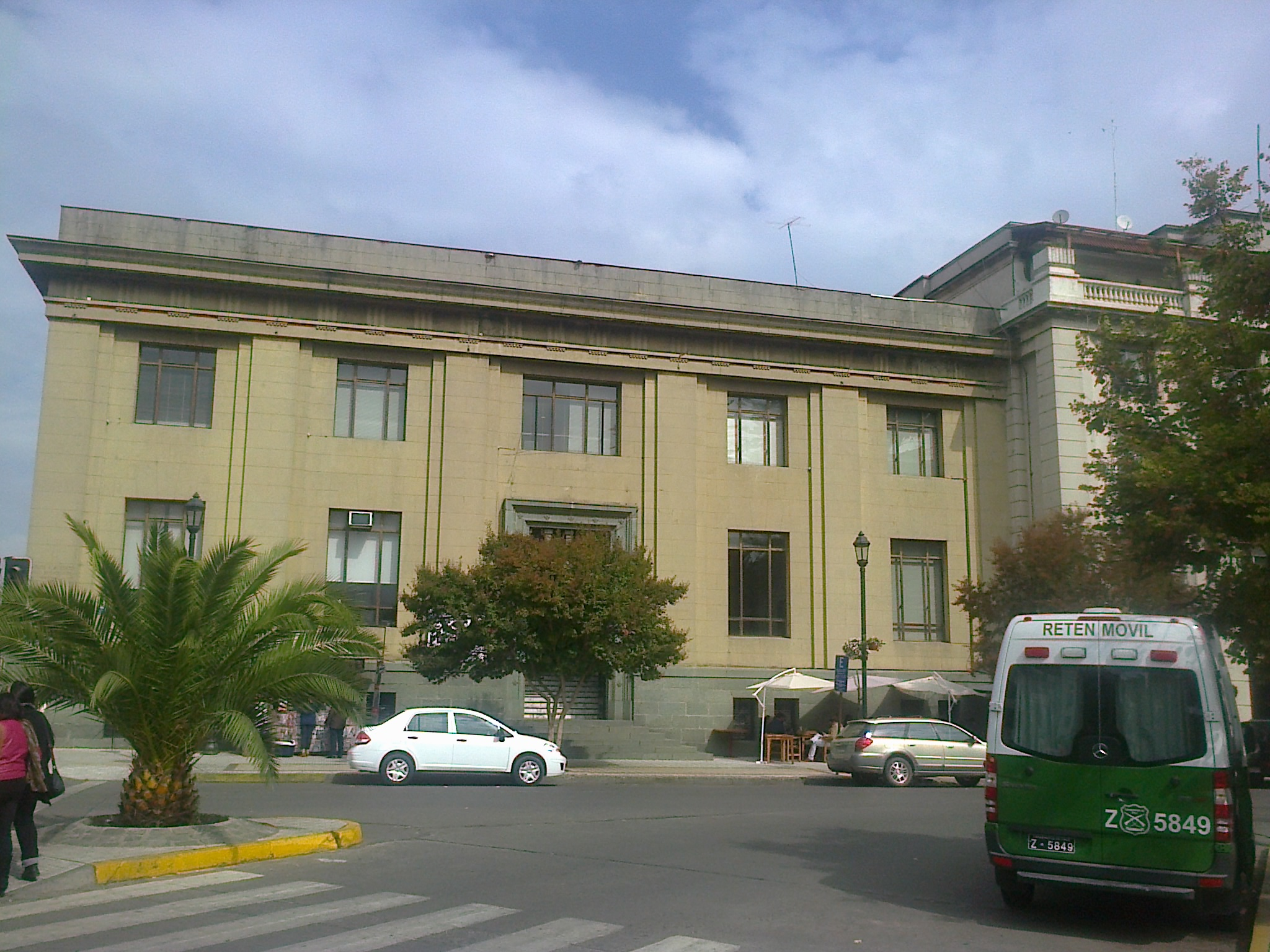 Antiguo edificio del Banco de Talca, hoy Fiscalía local.